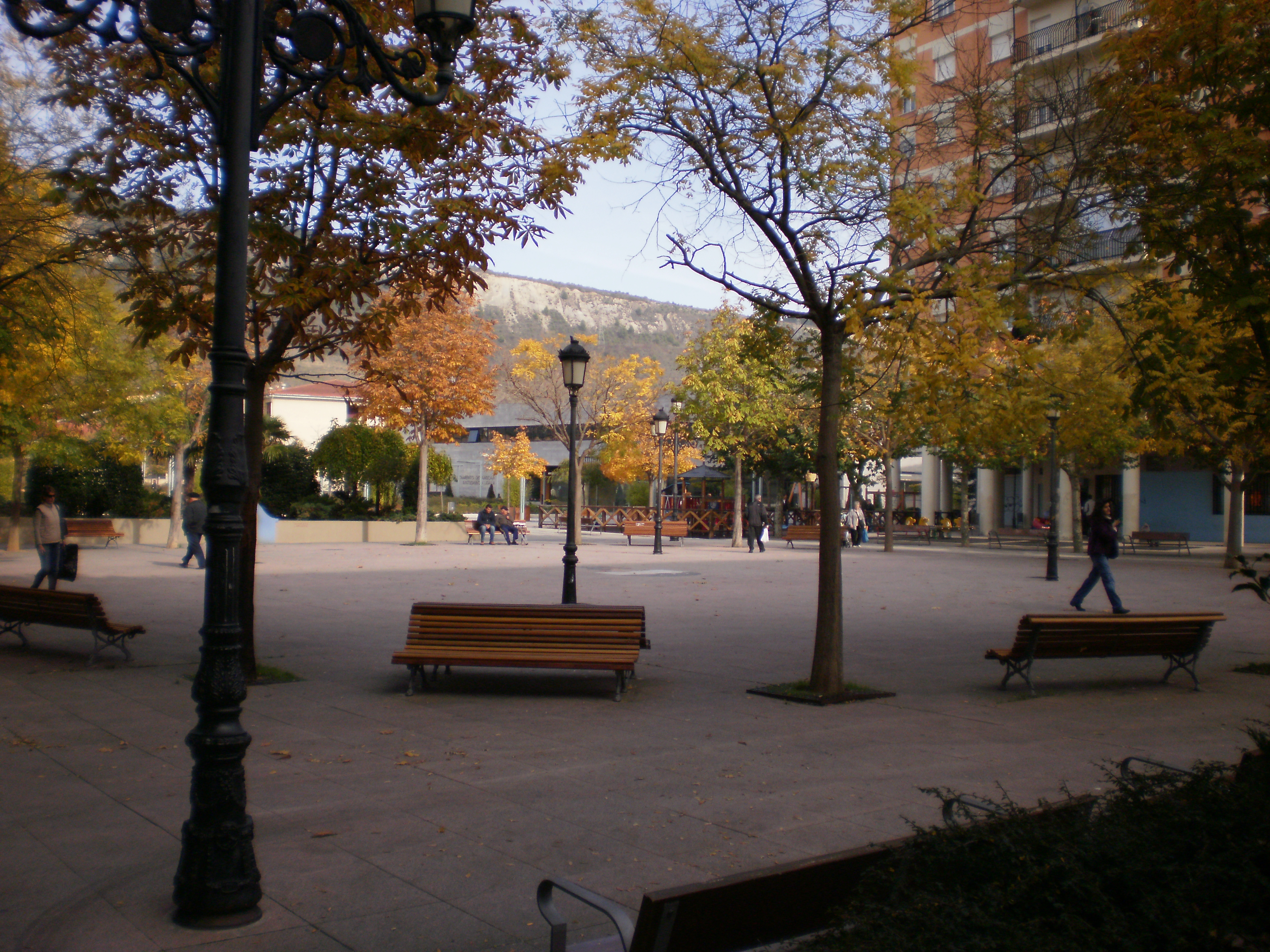 Plaza Lapurbide de Ansoáin (España)